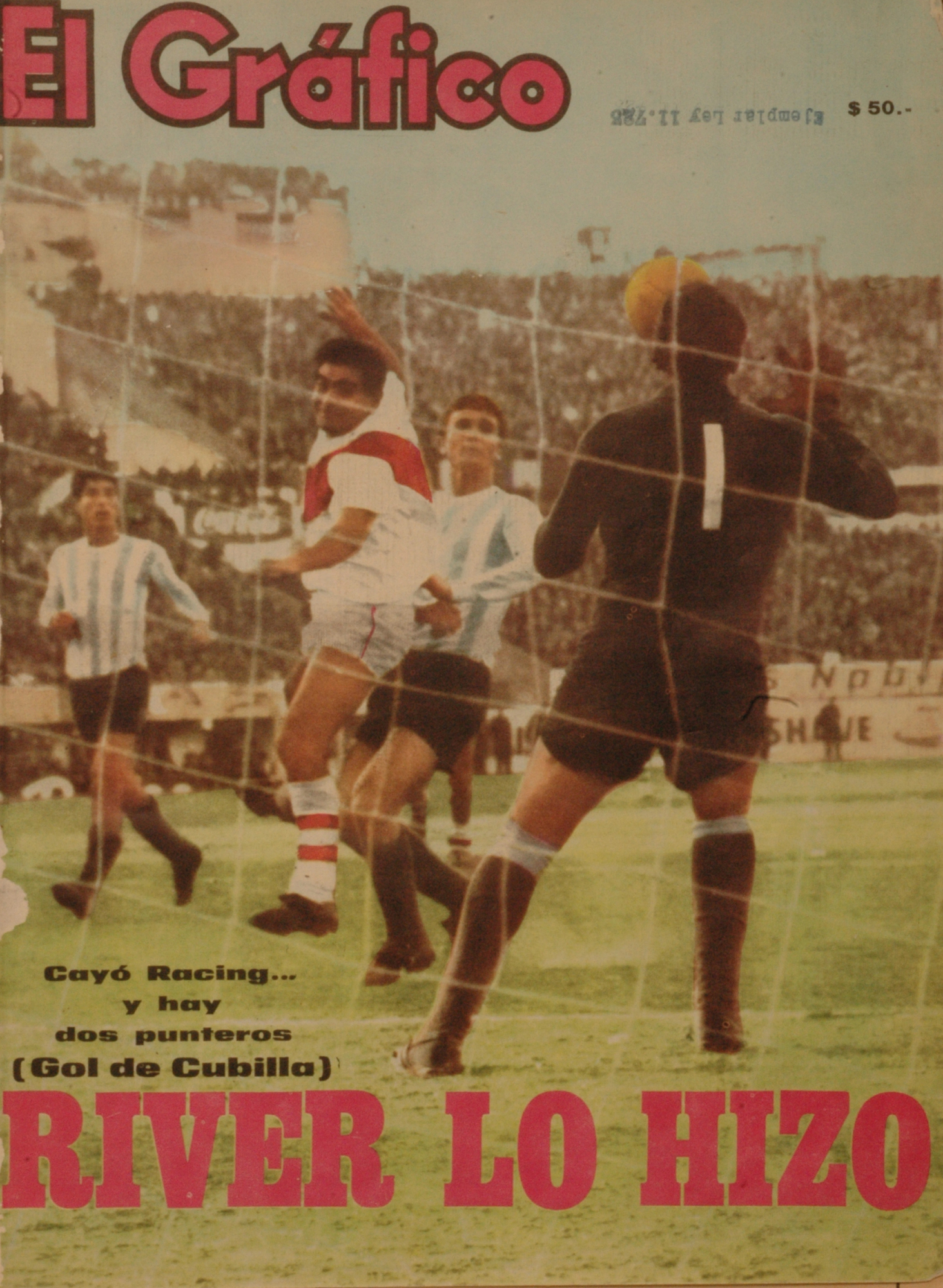 El Grafico del 06 de Septiembre de 1966. Edicion 2448